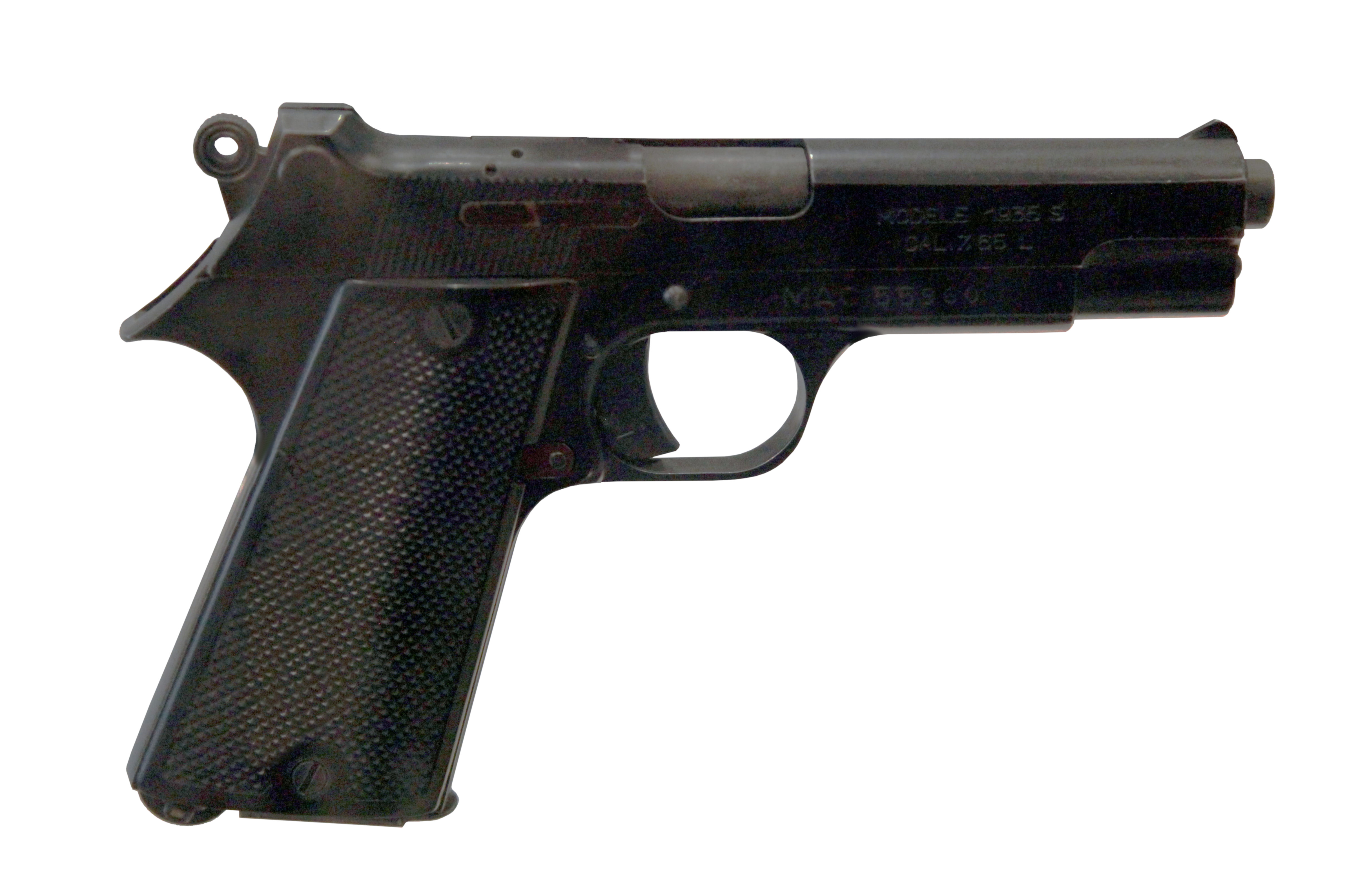 Pistolet automatique modèle 1935 S on display at Musée de l'Armée